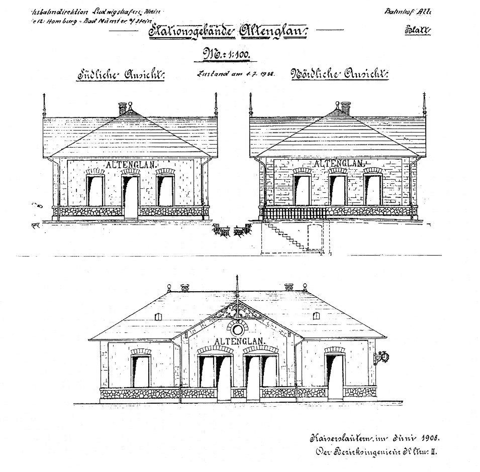 Empfangegebäude des Bahnhof Altenglan